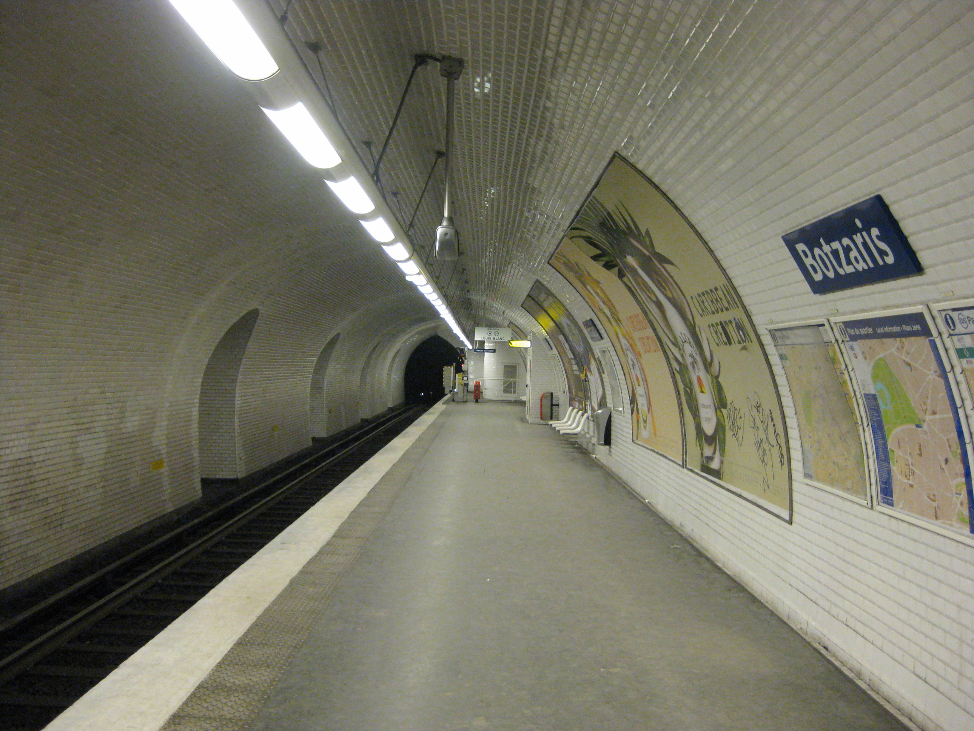 Quai de la station de métro Botzaris